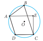 նկար 1